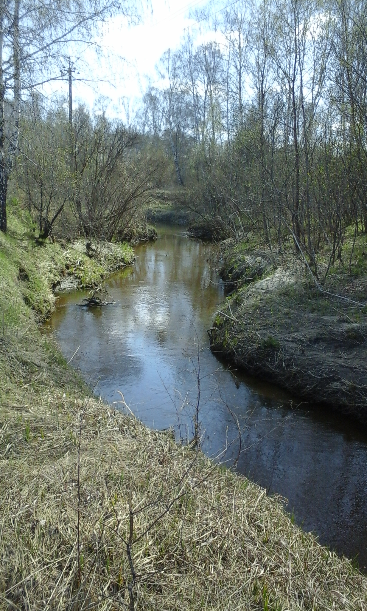 Река Сюткес в границах р.п. Муромцево